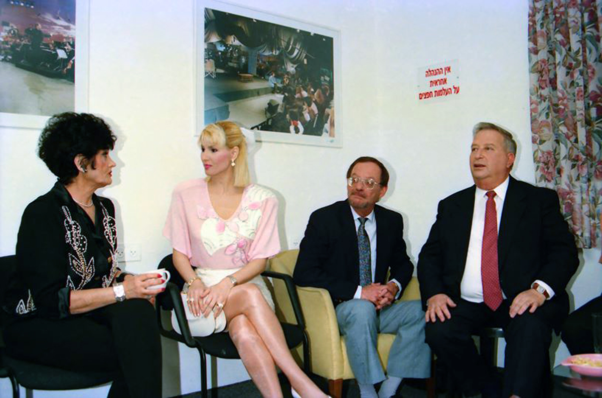 יריב בן אליעזר עם פנינה רוזנבלום יפה ירקוני ובייגה אברהם שוחט